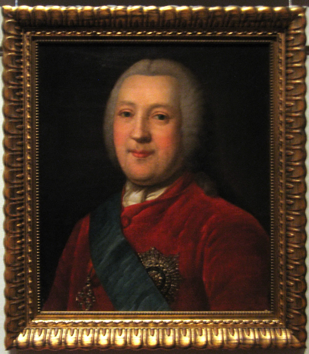 Н.И. Панин. Неизвестный художник, ГИМ. 18 век.